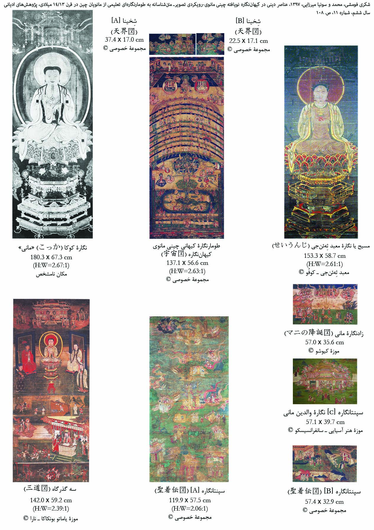 بخشی از نویافته ها دَه پرده ابریشمین و منقوش است که در ژاپن و آمریکا بین سالهای 2006 تا 2016 میلادی بازشناسی شده است. شکری فومشی، محمد و سونیا میرزایی، 1397، عناصر دینی در کیهان‌نگاره نویافته چینی مانوی-رویکردی تصویرـ متن‌شناسانه به طومارنگاره‌ای تعلیمی از مانویان چین در قرن 13/14 میلادی، پژوهش‌های ادیانی سال ششم، شماره 11، ص. 108